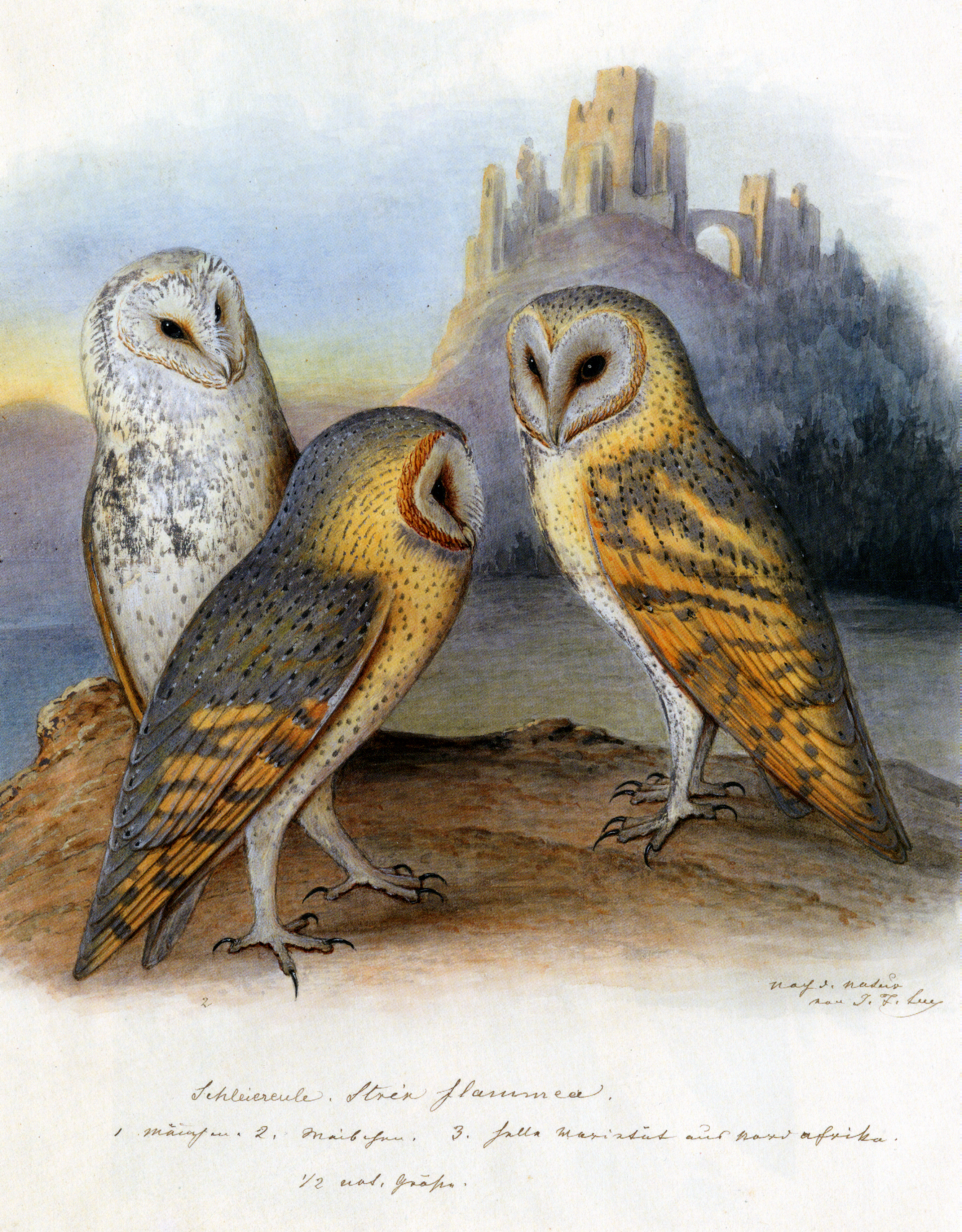 Schleiereulen: Abbildung aus dem Werk von Johann Friedrich Leu über die Vögel Europas